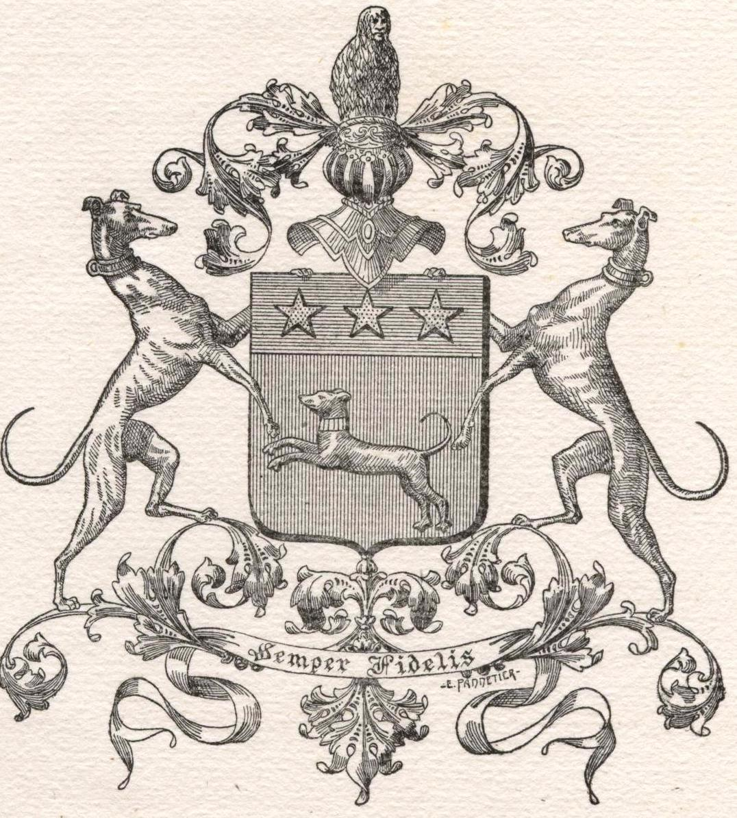 Armes de Ribier CPLT